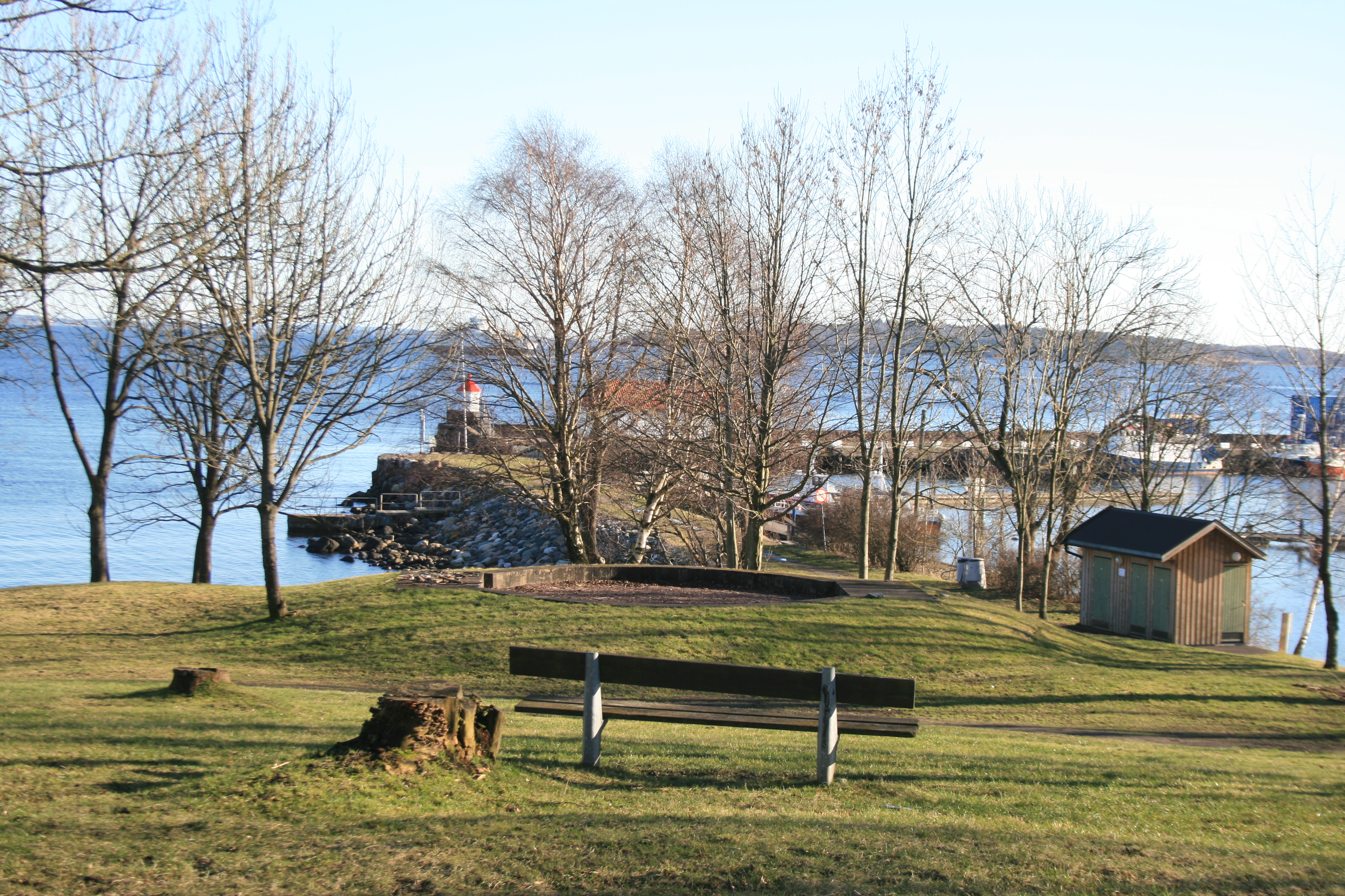 Hortenstangen og fyrtårnet. Til høyre Fyllinga småbåthavn.